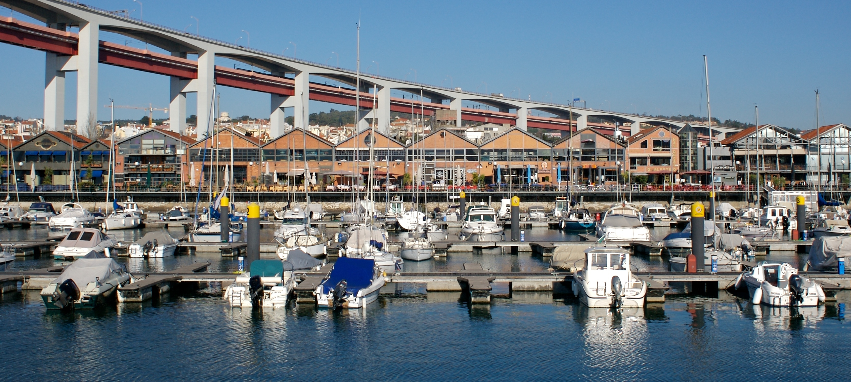 Docas